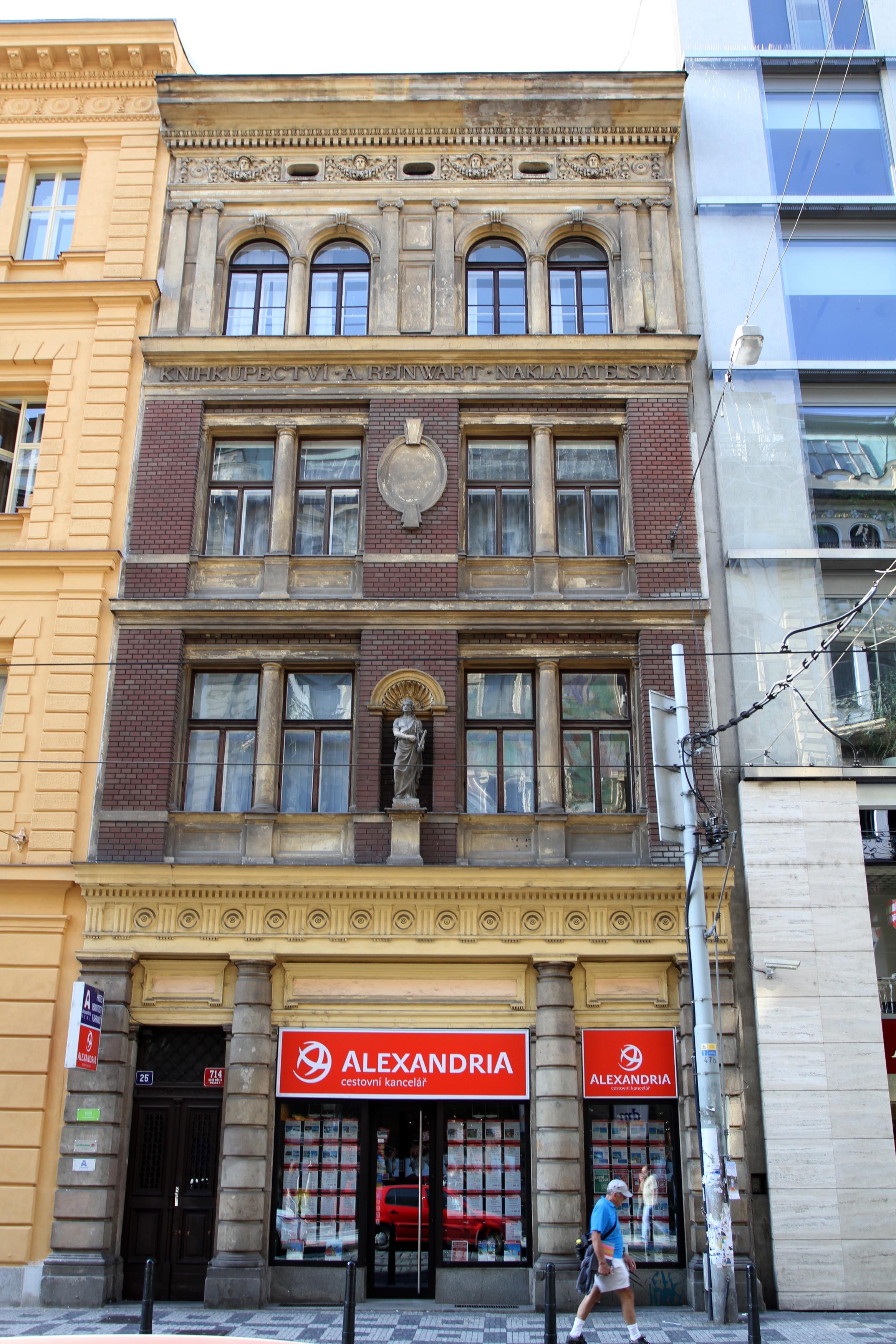 Činžovní dům (Nové Město), Praha 1, Vodičkova 714/25, Nové Město